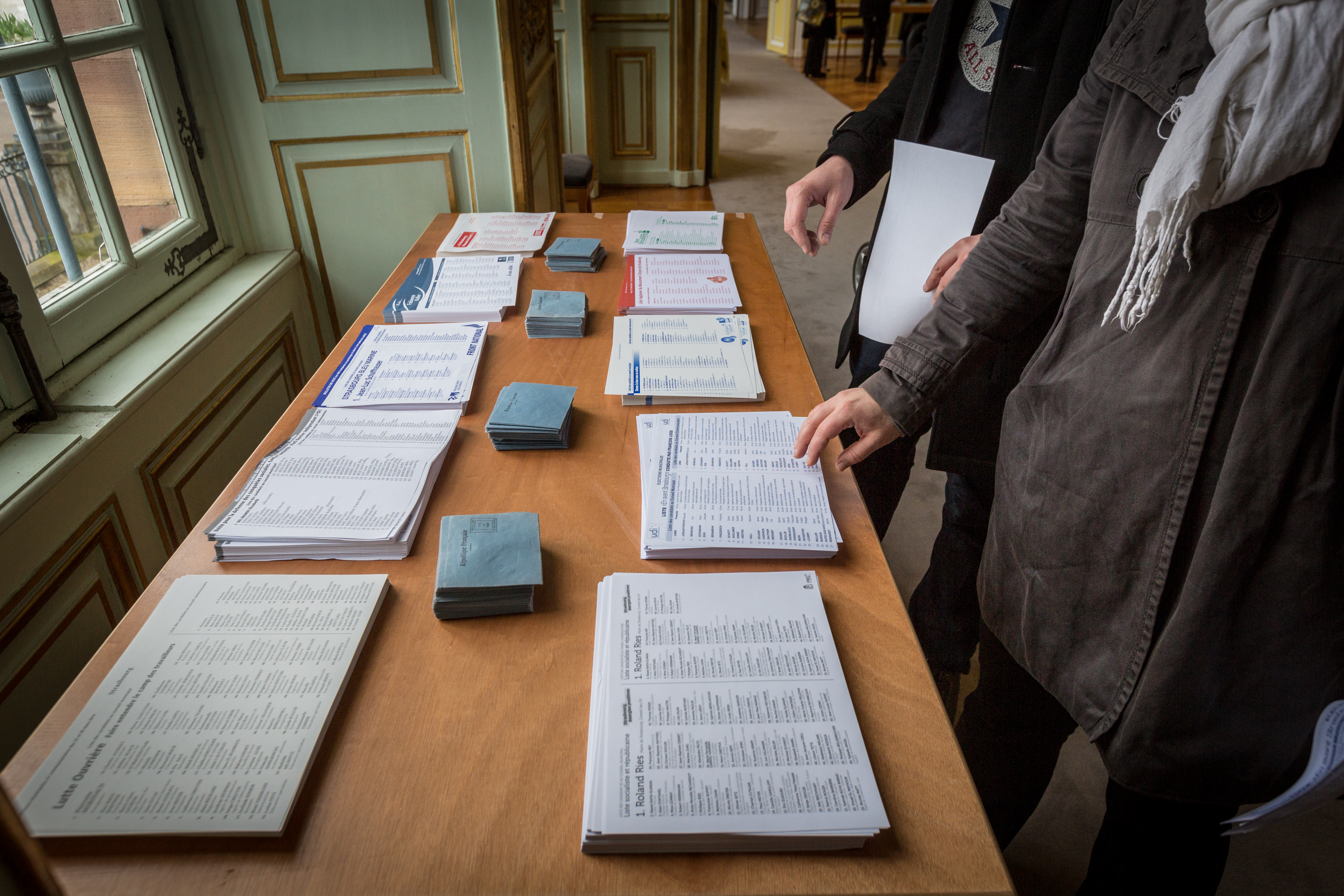 Strasbourg 1er tour des élections municiapales 23 mars 2014